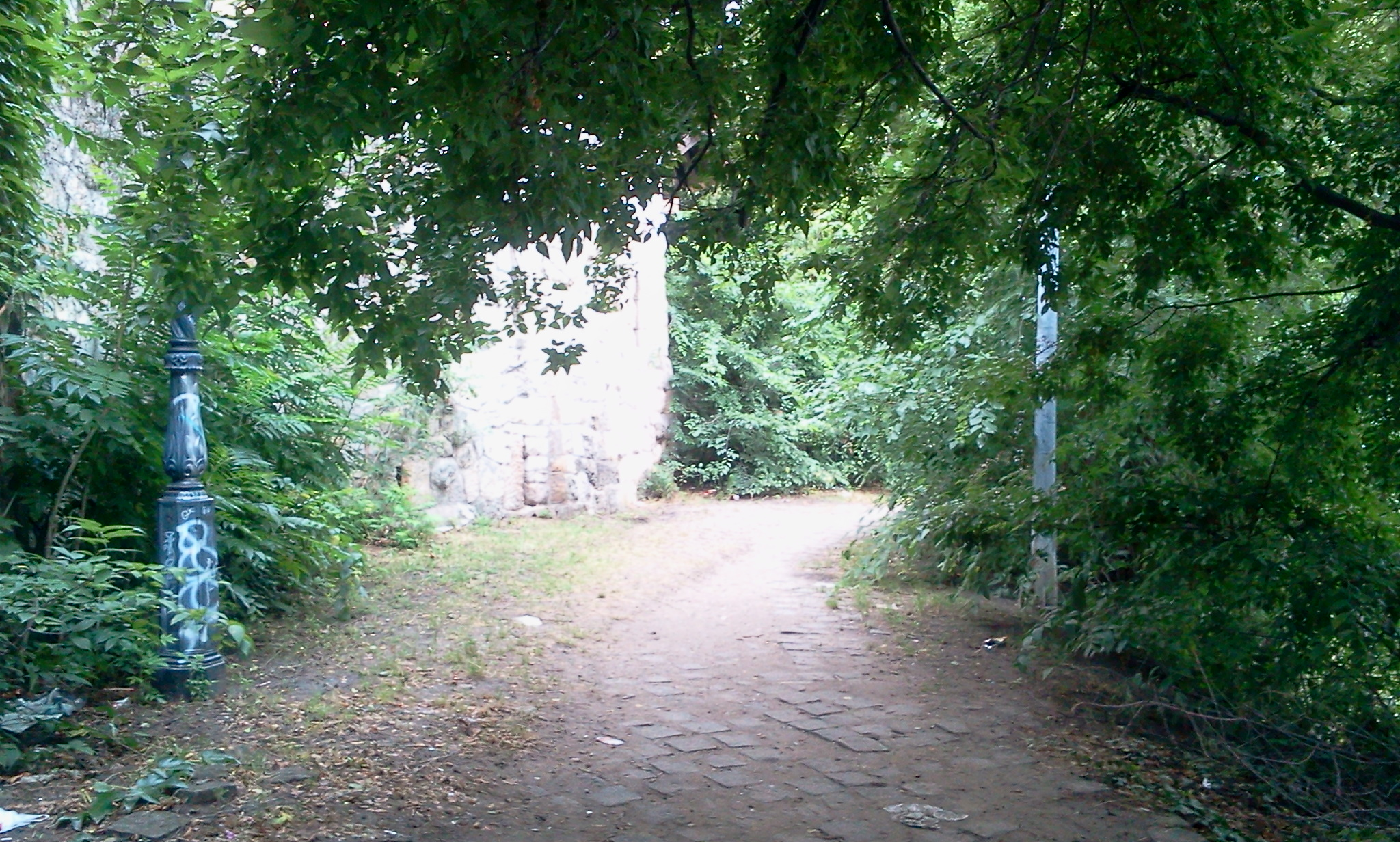 Budapest, City Park, 1146 Hungary